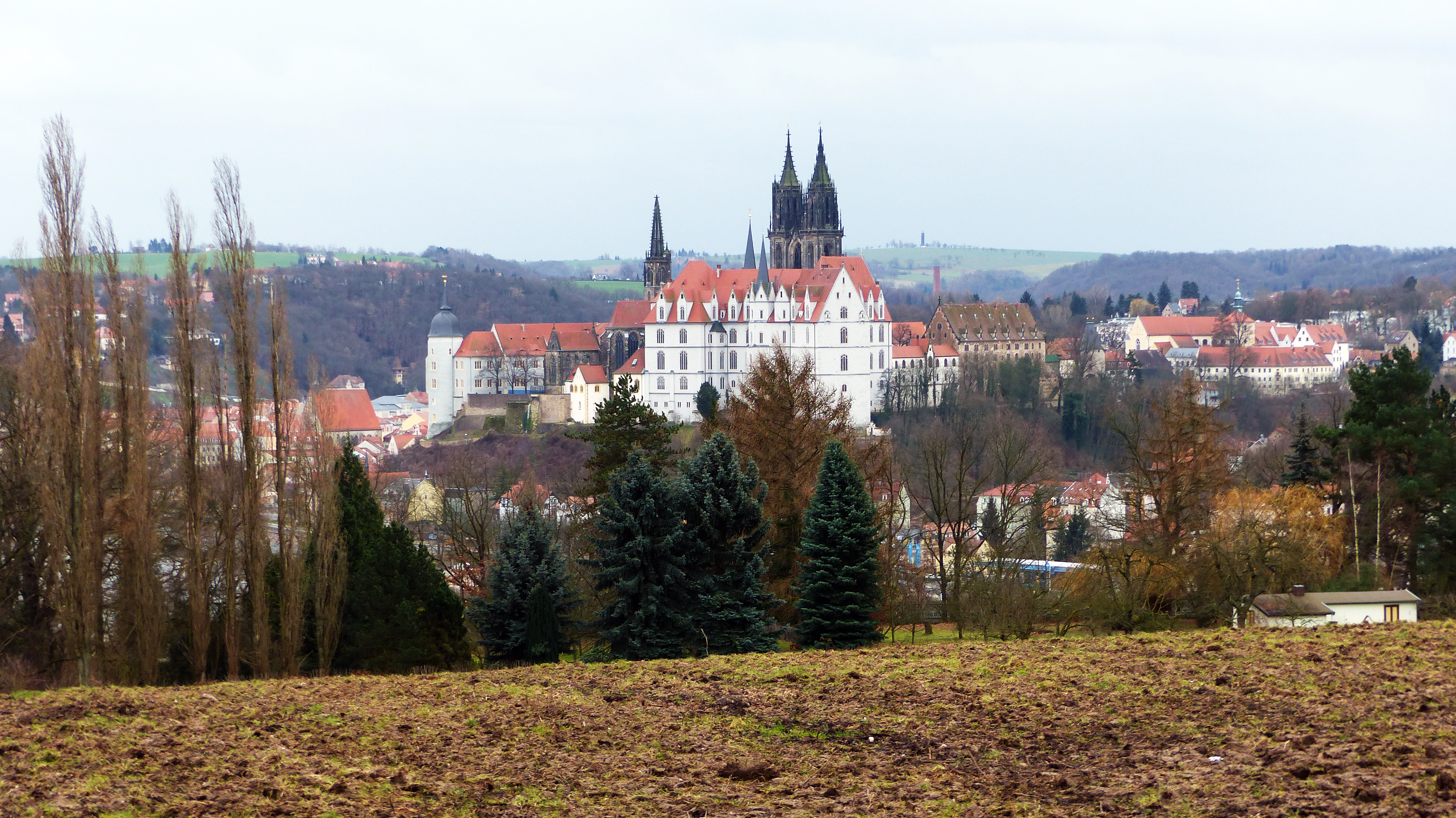 Blick auf die Nordseite der Albrechtsburg in Meißen von Proschwitz aus